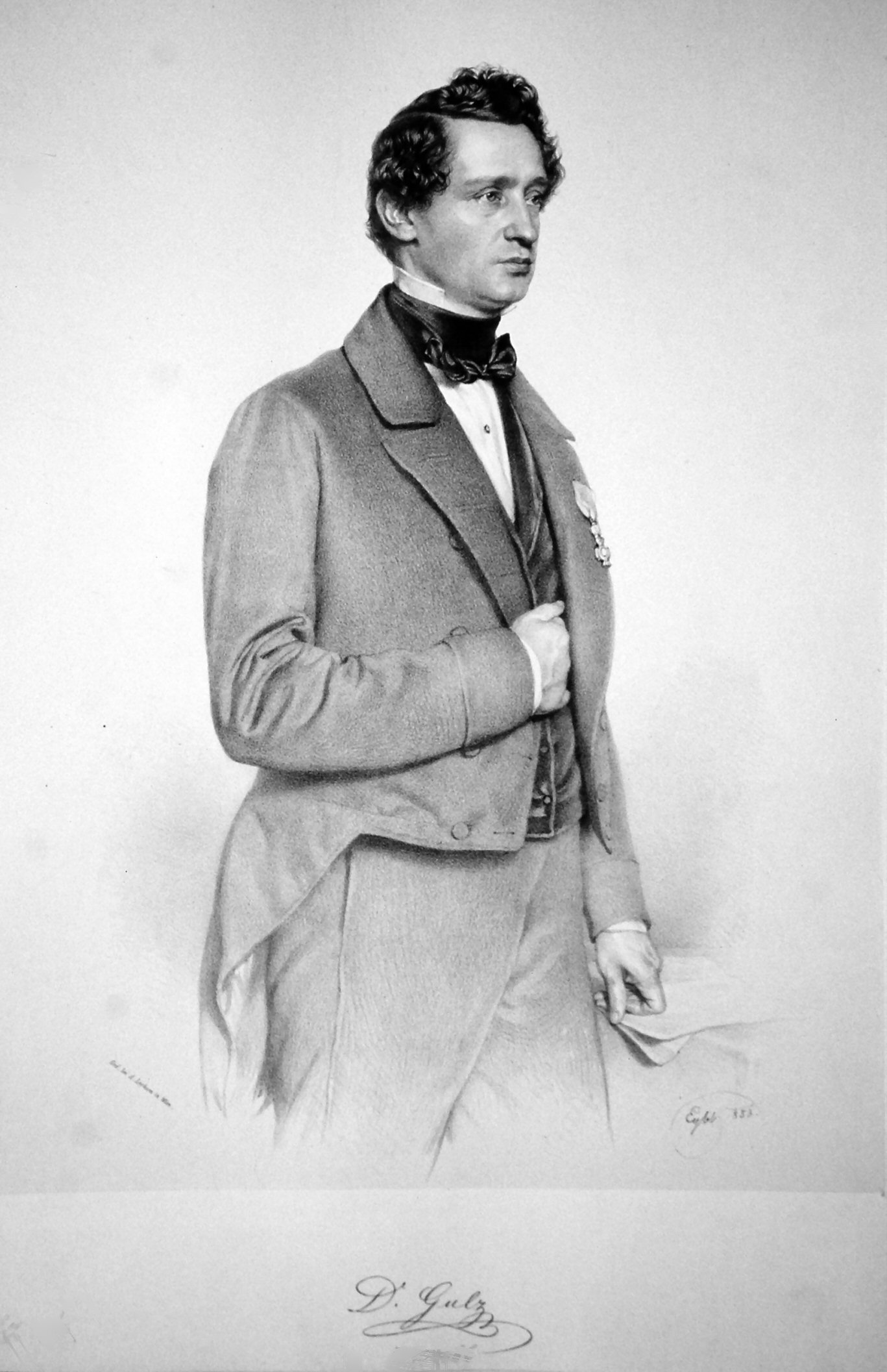 Ignaz Gulz (1814-1874), Arzt in Wien.. Lithographie von Franz Eybl, 1853.